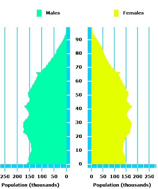 Возрастно-гендерная диаграмма населения Австралии 2013г.